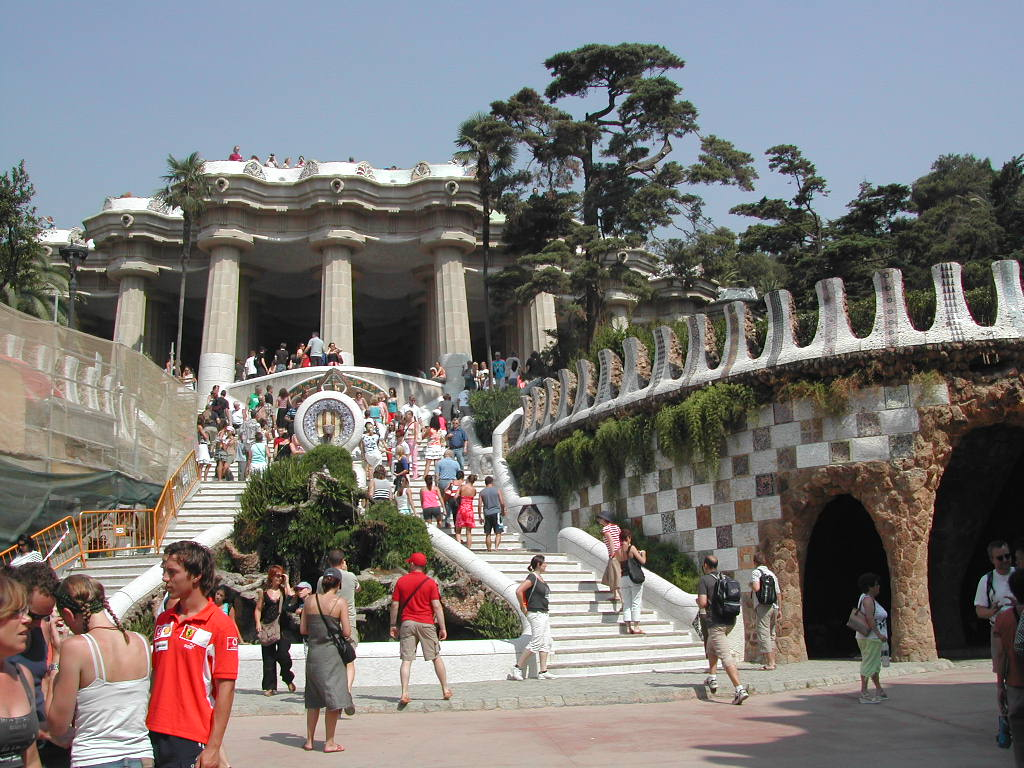 Parc Güell - Entrée